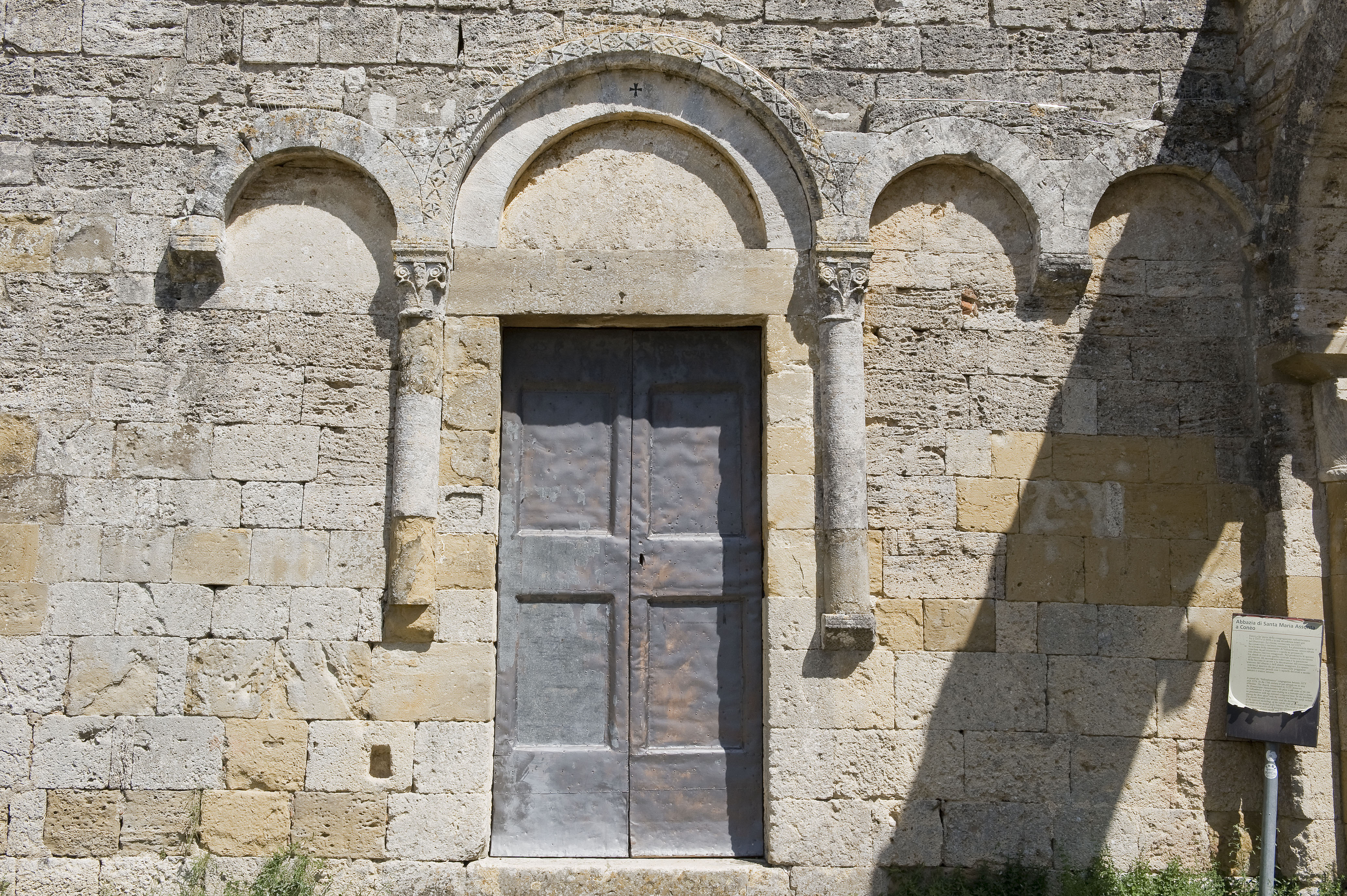 Portale d'accesso della Abbazia di santa Maria Assunta a Conèo, Colle Val d'Elsa